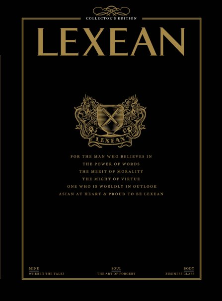 Lexean Magazine